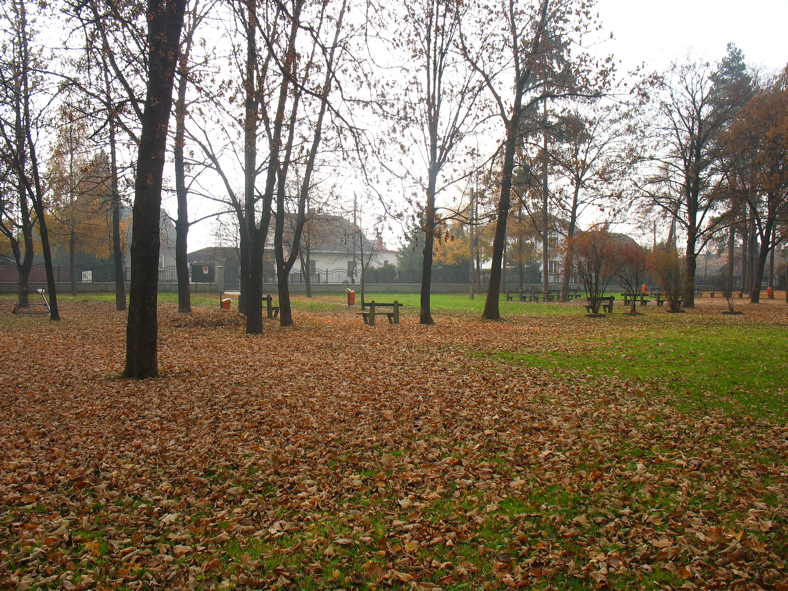 Park przy Dworku w Nowej Wsi [2]